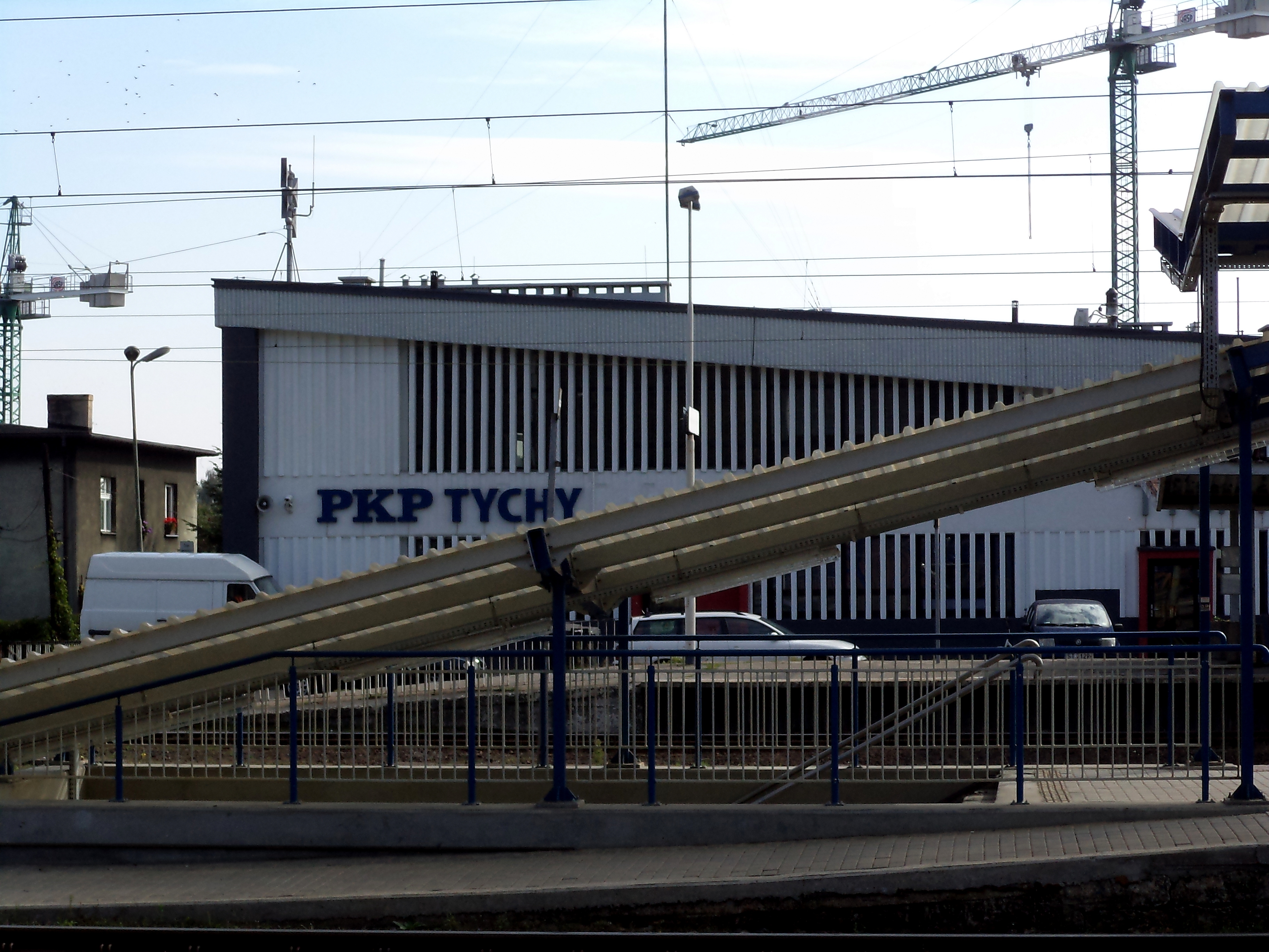 Stacja kolejowa w Tychach, w województwie śląskim, w Polsce.